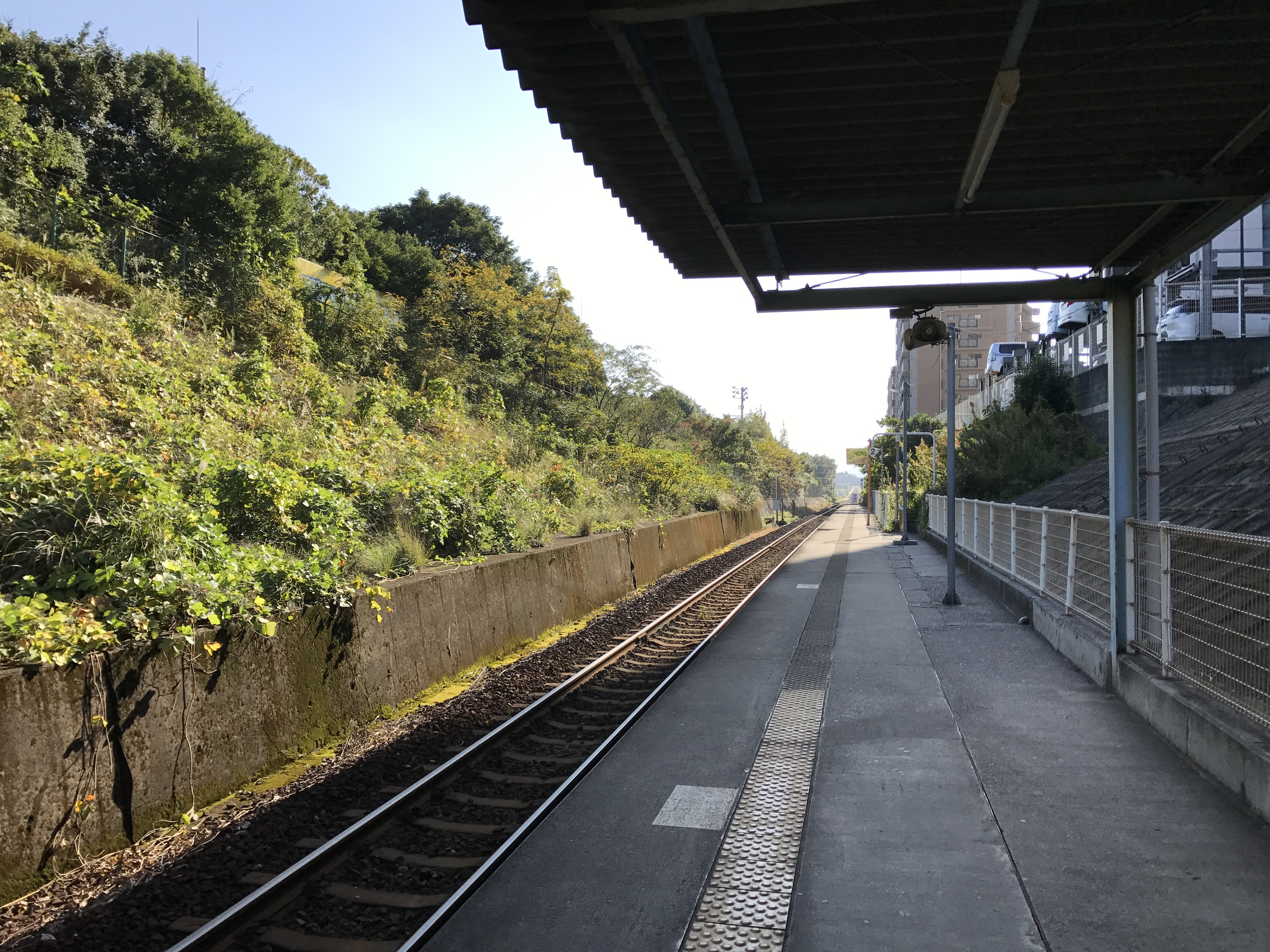 志井公園駅のホーム(奥は志井方面)